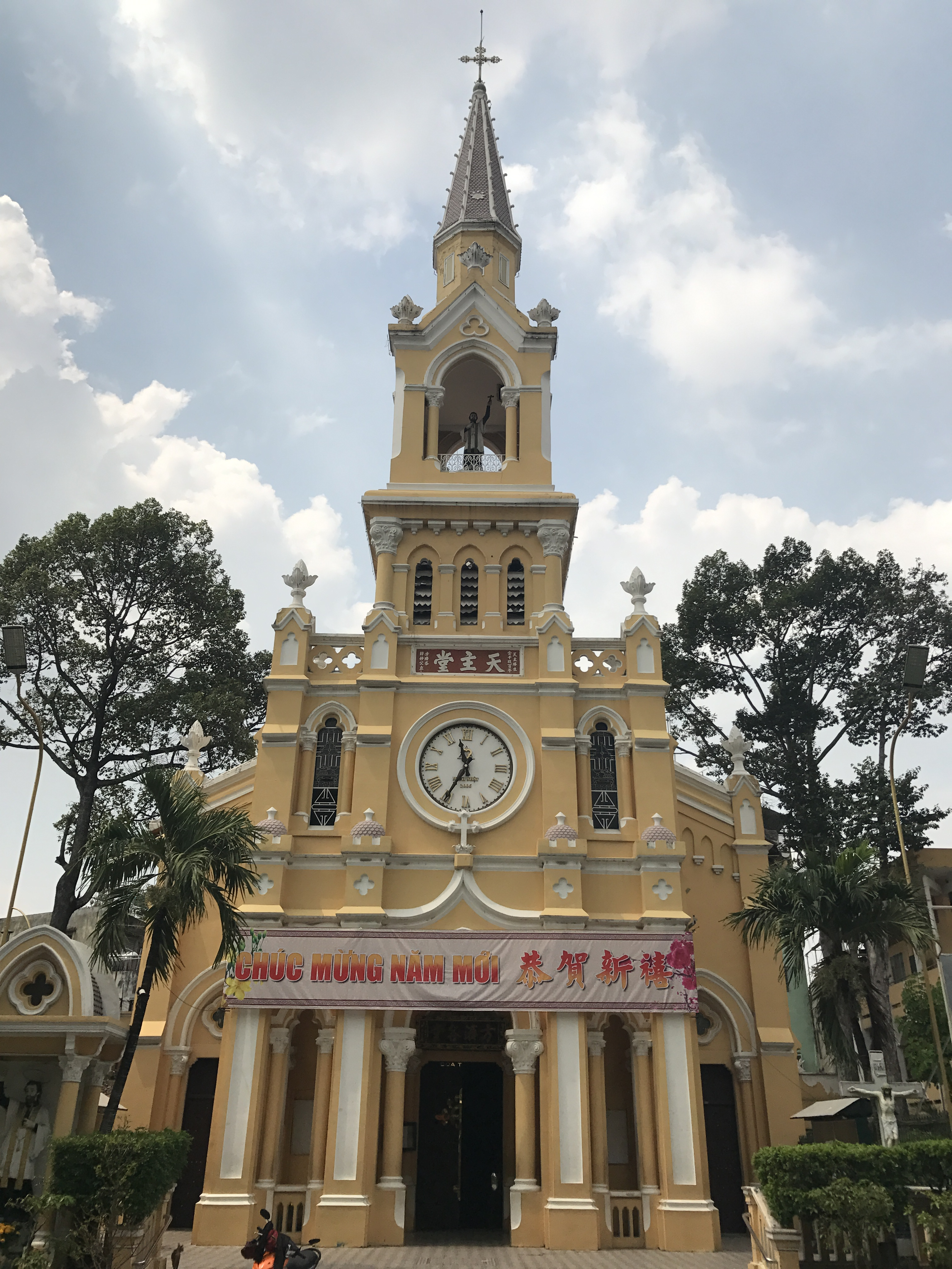 圣方济各堂 胡志明市 堤岸